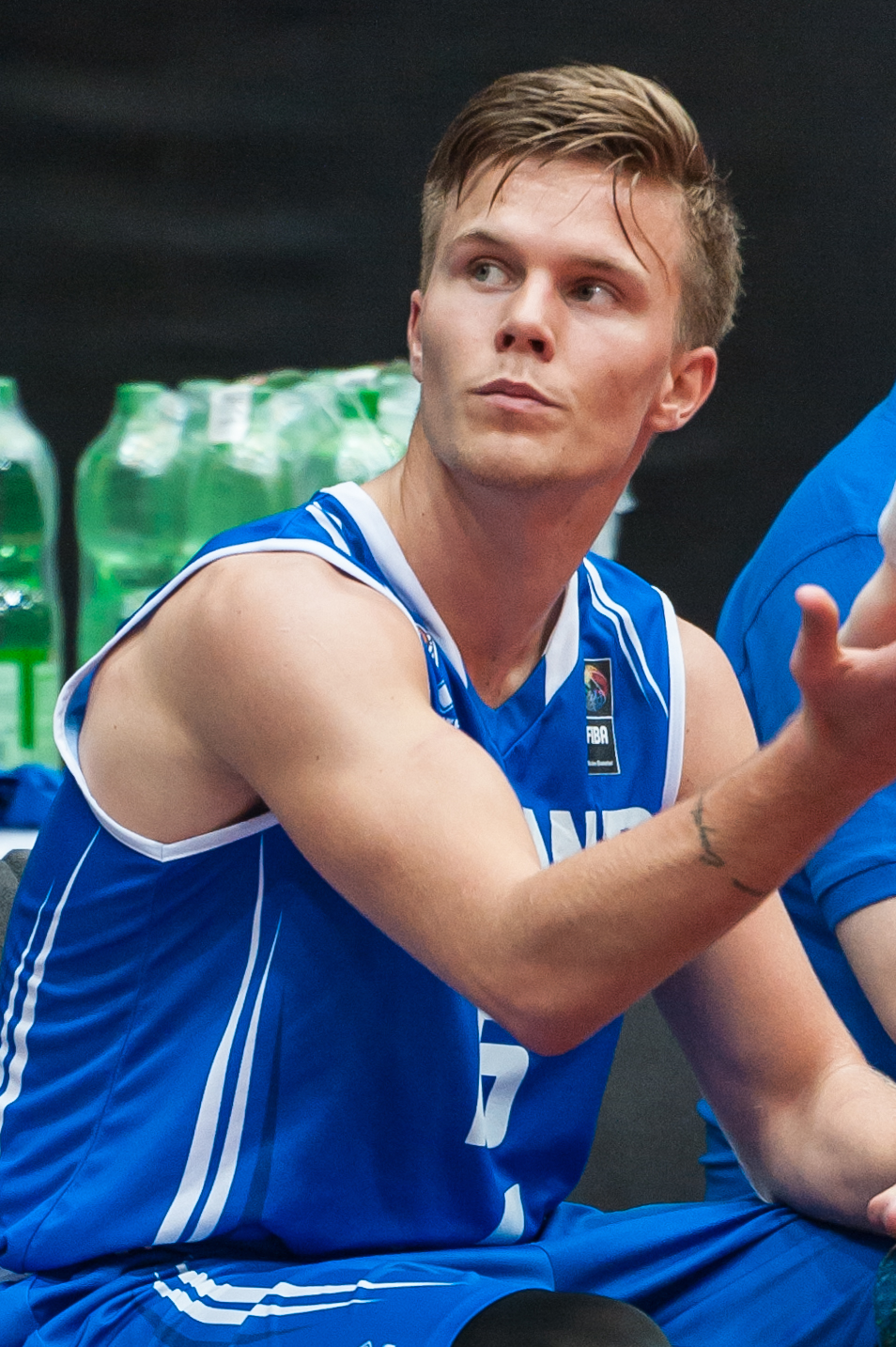 ÖBV Vier-Nationen-Turnier vom 12.-14. August 2016 in Schwechat: Polen vs Island. Bild zeigt Martin Hermannsson (ISL).